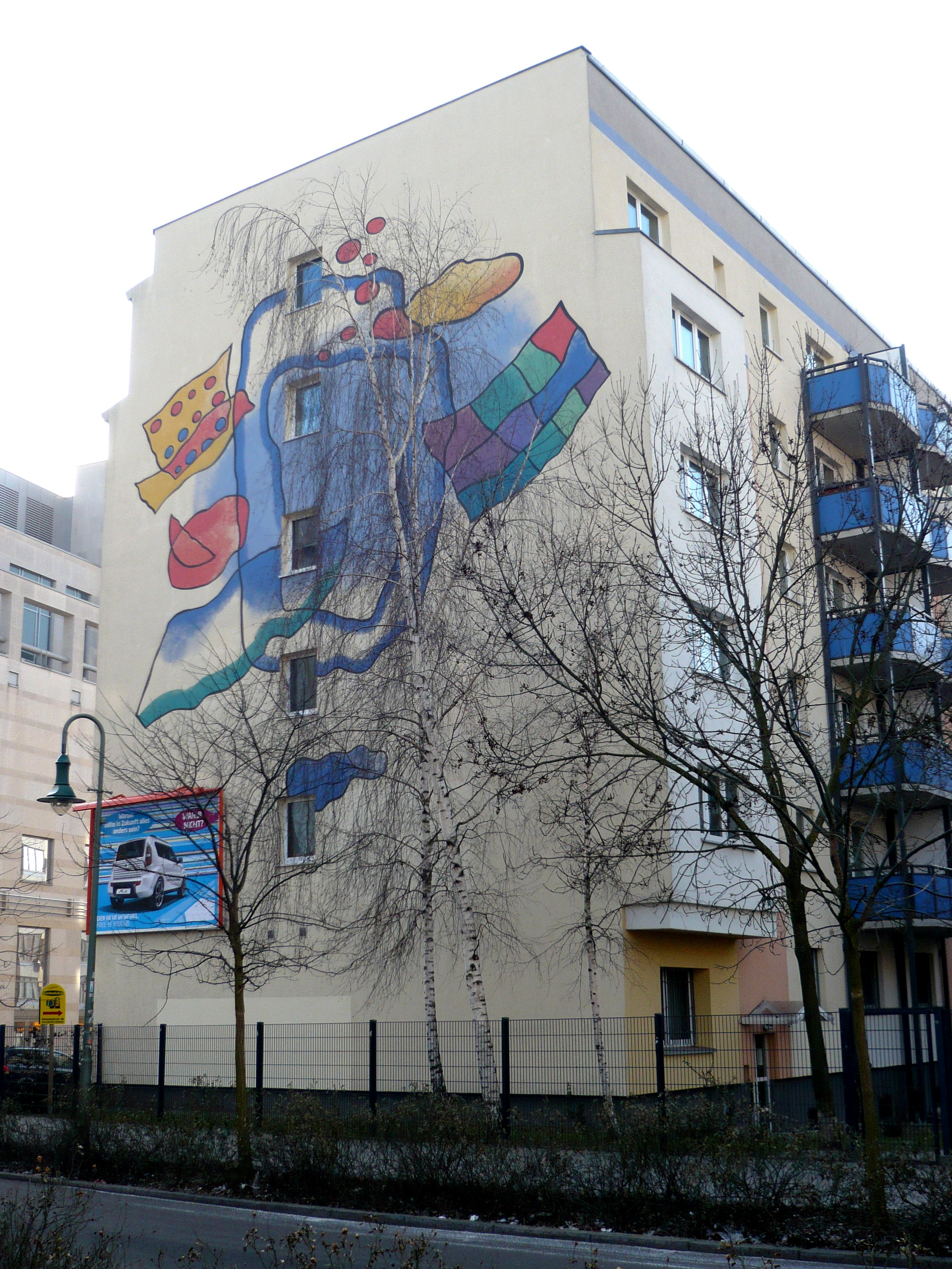 Schleidenplatz im Winter: Randbebauung (3): Giebelbild